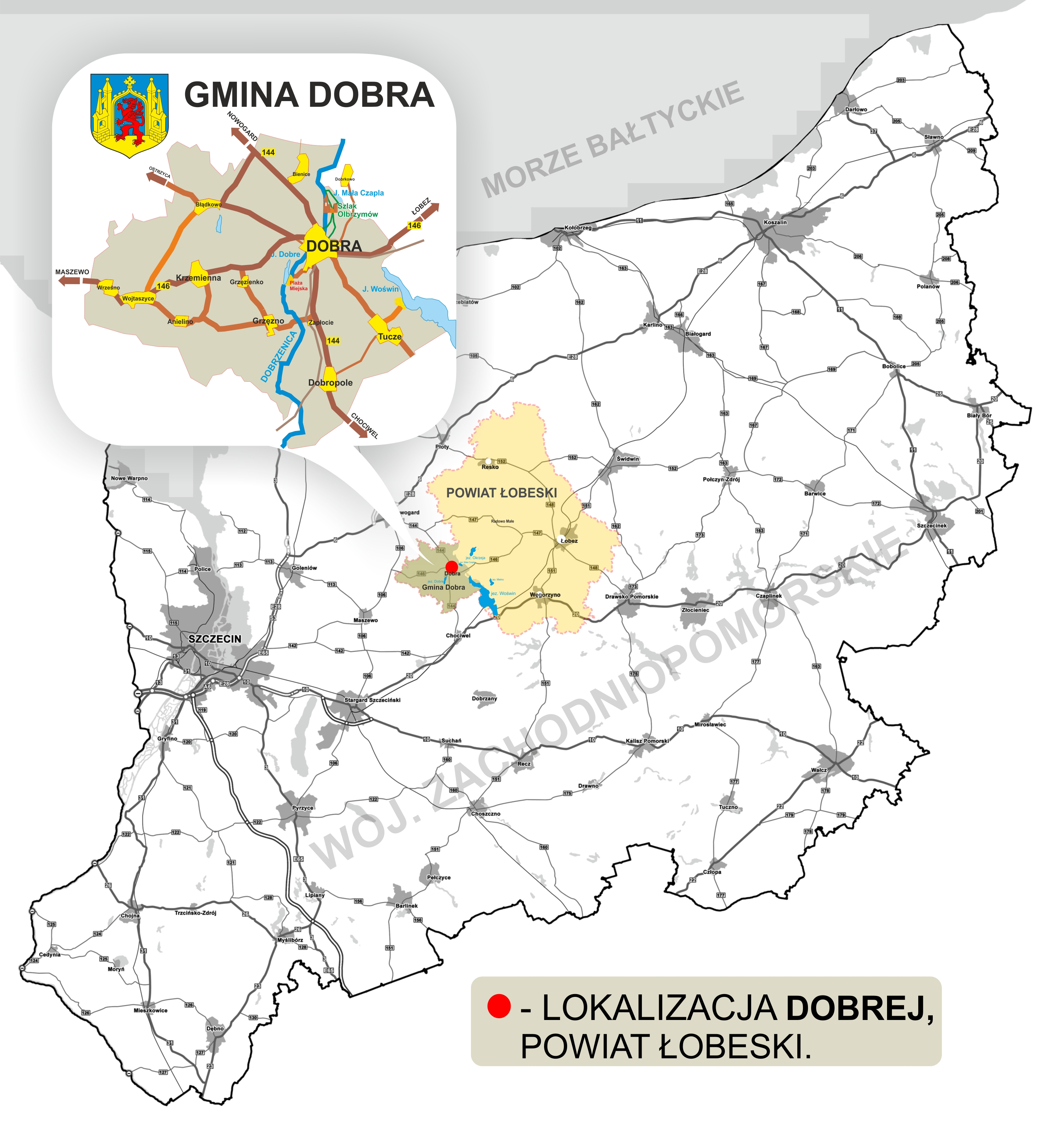 Mapa Dobrej. Autor Saperitosan